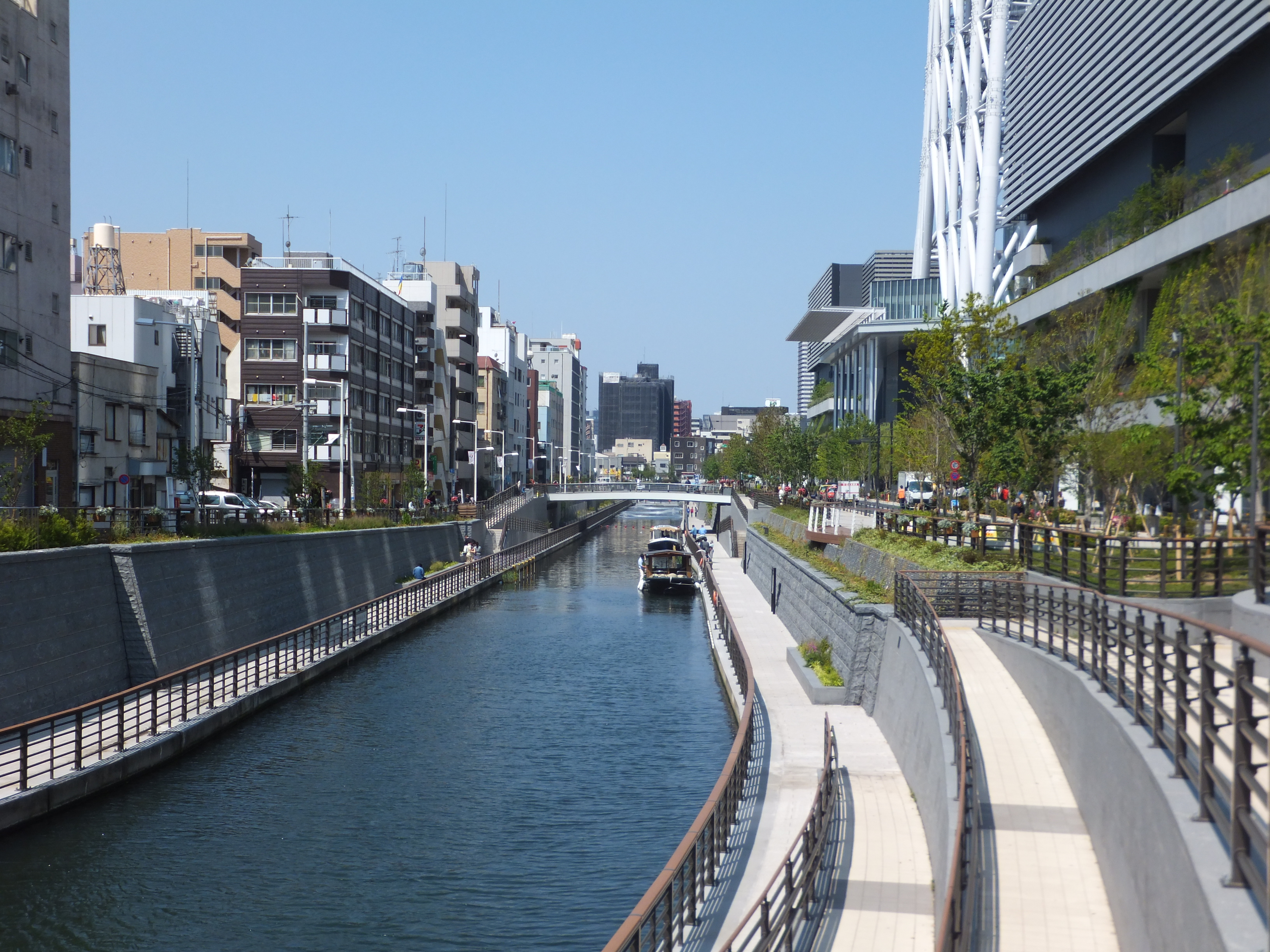 北十間川、京成橋より東京スカイツリー方（西側）を望む。